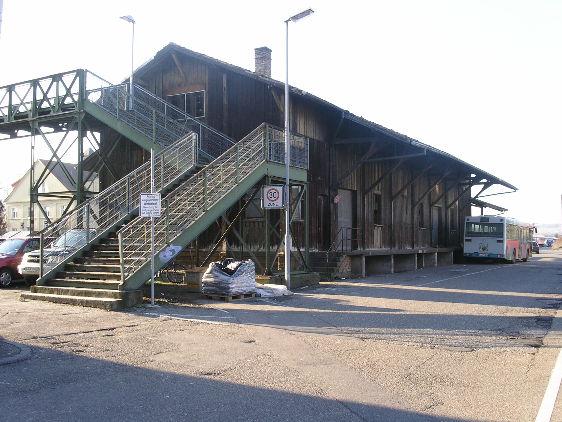 Aufnahme vom 11. Dezember 2005; kurz vor dem Abriss; davor der Fußgängersteg, der im Verlauf der Modernisierung der Elsenztalbahn durch einen Neubau ersetzt wurde